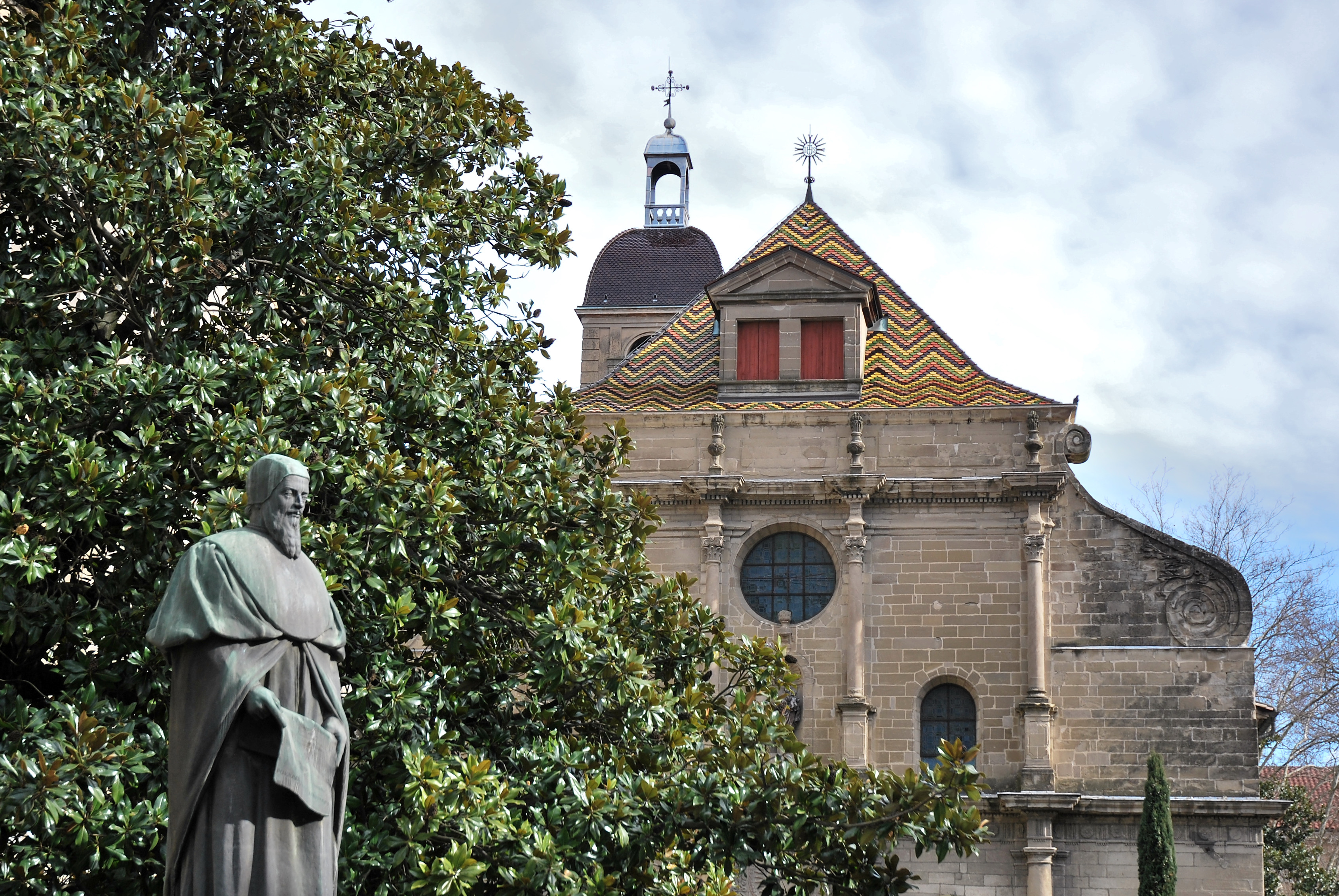 Chapelle Saint-Just du lycée Gabriel-Faure.